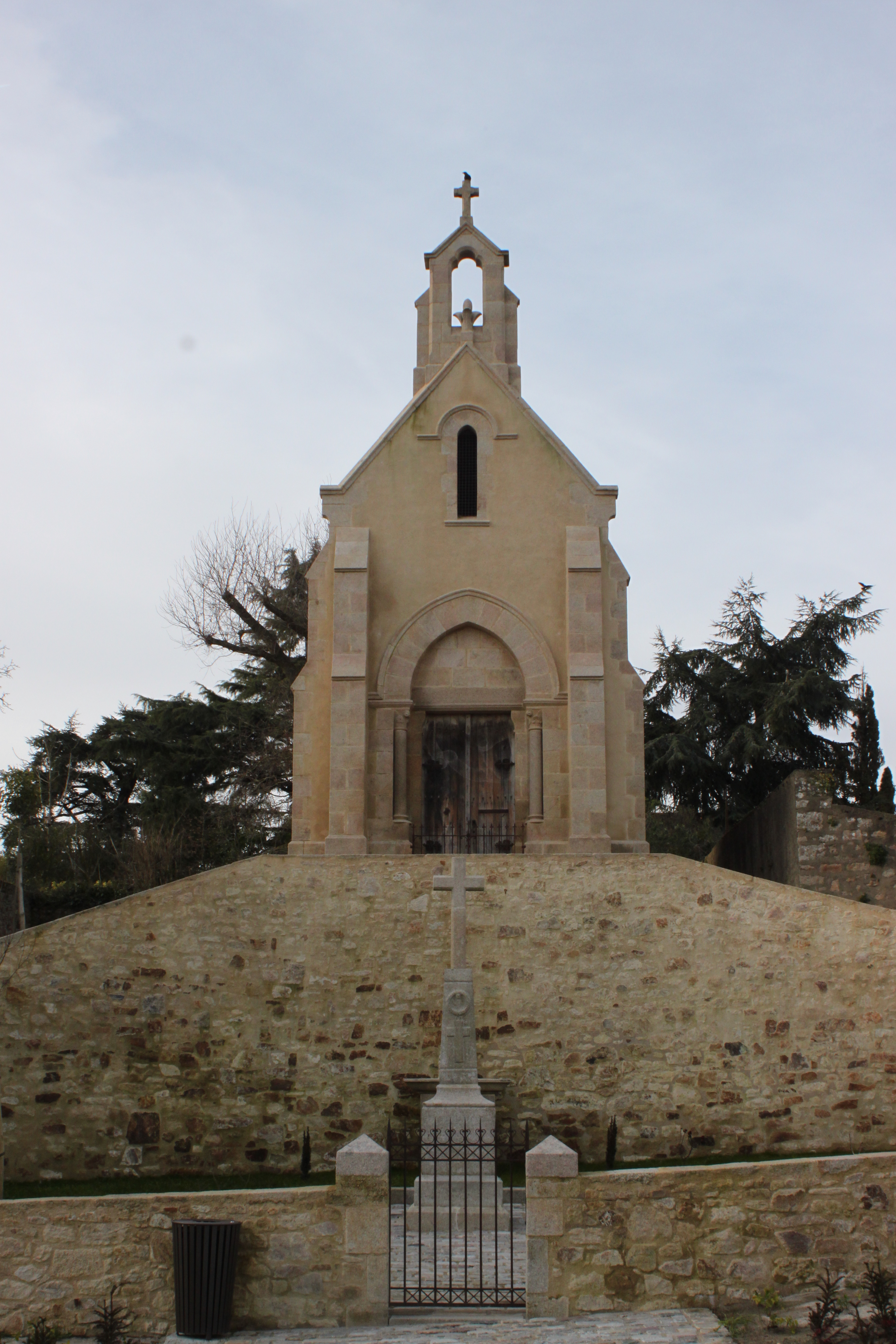 Chapelle Saint-Michel, Fr-85-Mortagne-sur-Sèvre.